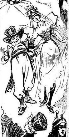 La Rosière du XXIème arrondissement et son maire marieur.